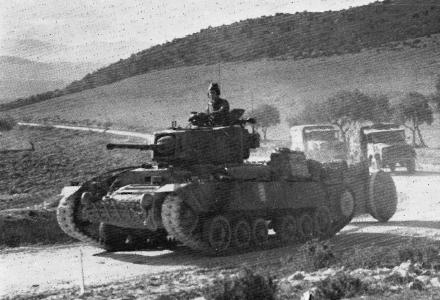 Valentine Mk III tank, Tunisia